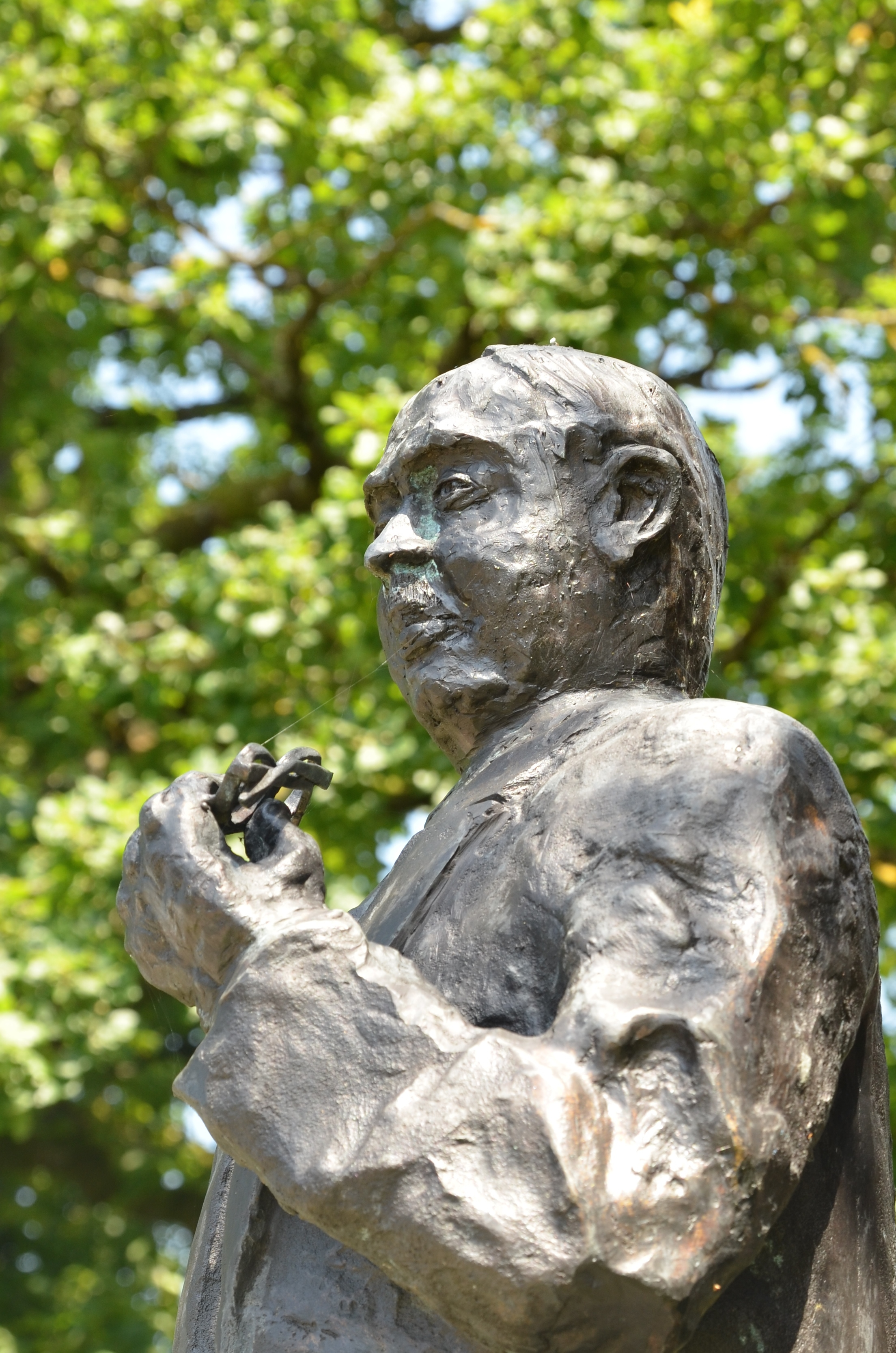 Rièzes (Chimay-Belgique) - monument à Arthur Masson, né dans ce village en 1896. Œuvre de Robert Bronchart, 2003.